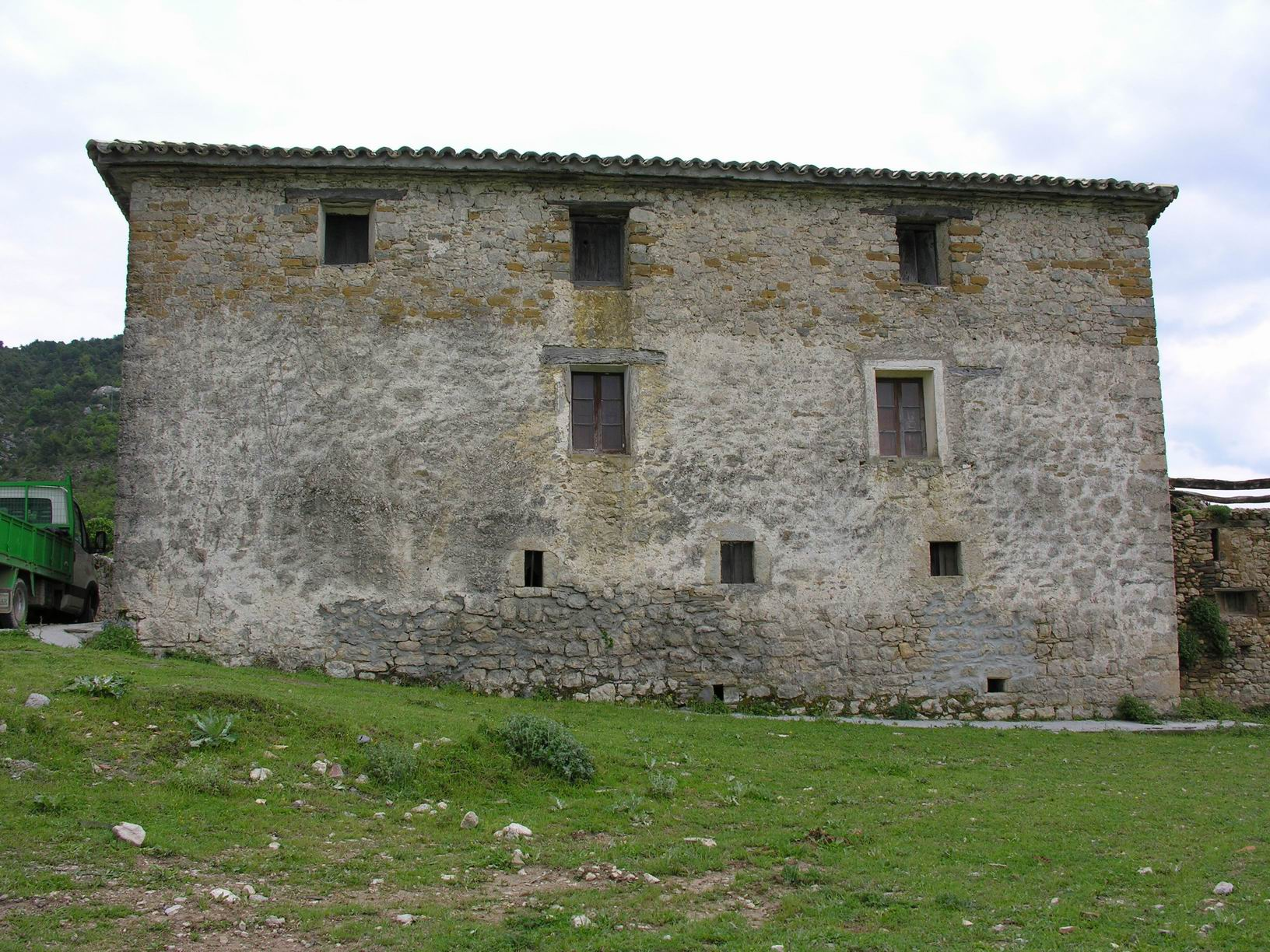 La Fueva, Sobrarbe